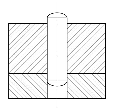 Imagen de unión con pasador cilíndrico.